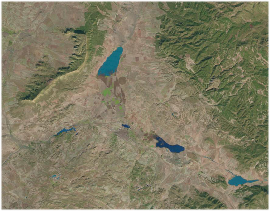 Vista desde Landsat 5 de la laguna de San Benito (centro izquierda) y otras zonas inundadas durante las extraordinarias lluvias, observándose el embalse de Almansa lleno, la zona del instituto de Almansa inundada y los llanos hacia el este encharcados.